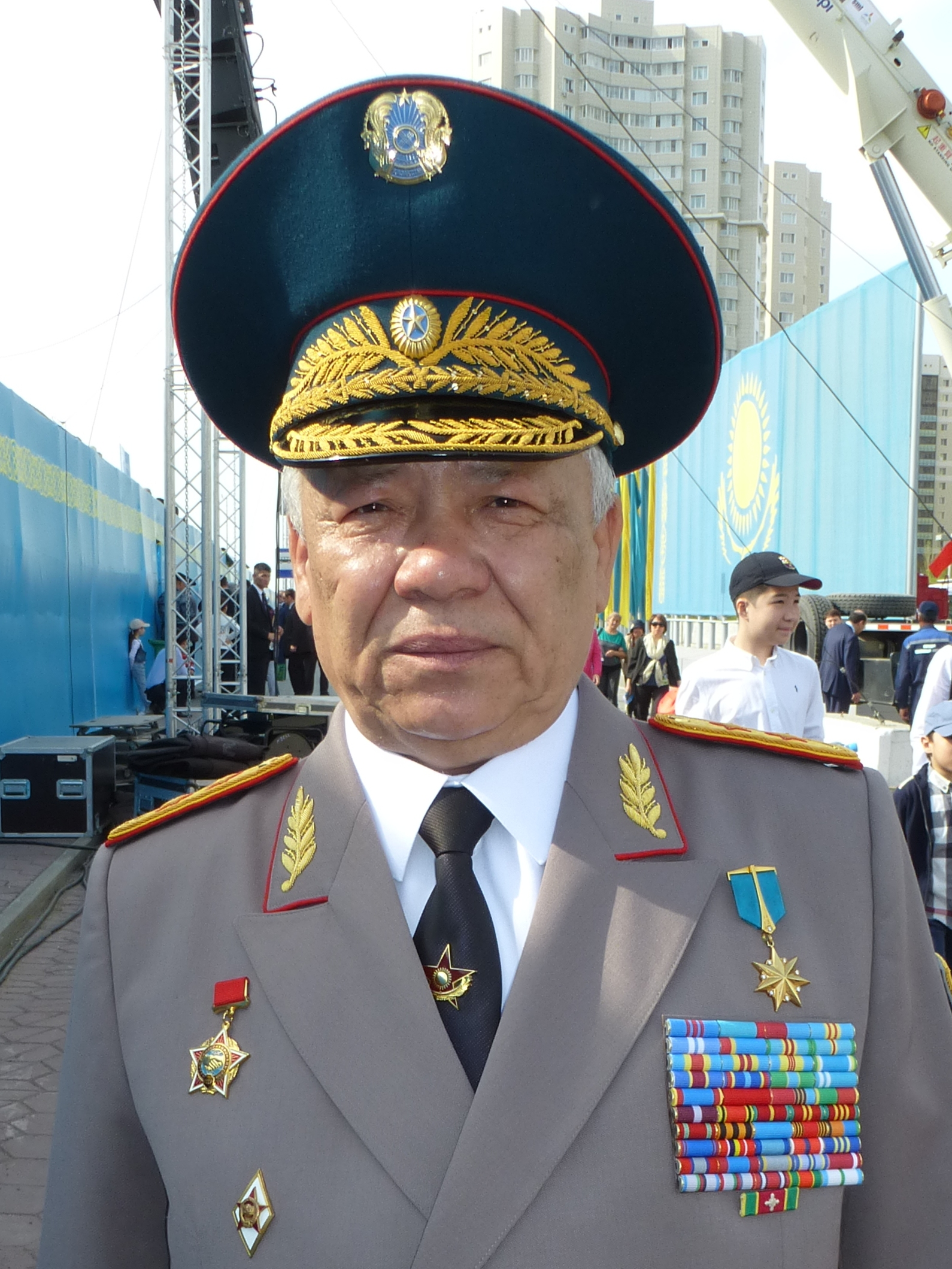 Ертаев Бахытжан Ертаевич. Халык Кахарманы. Генерал-лейтенант